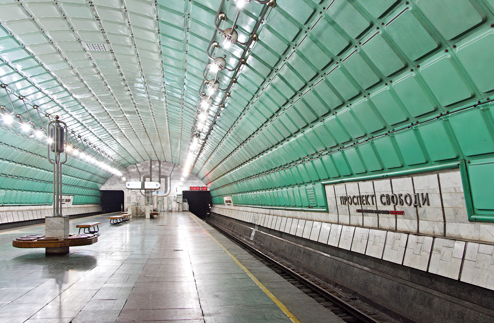 Станция «Проспект свободы» Днепровского метрополитена